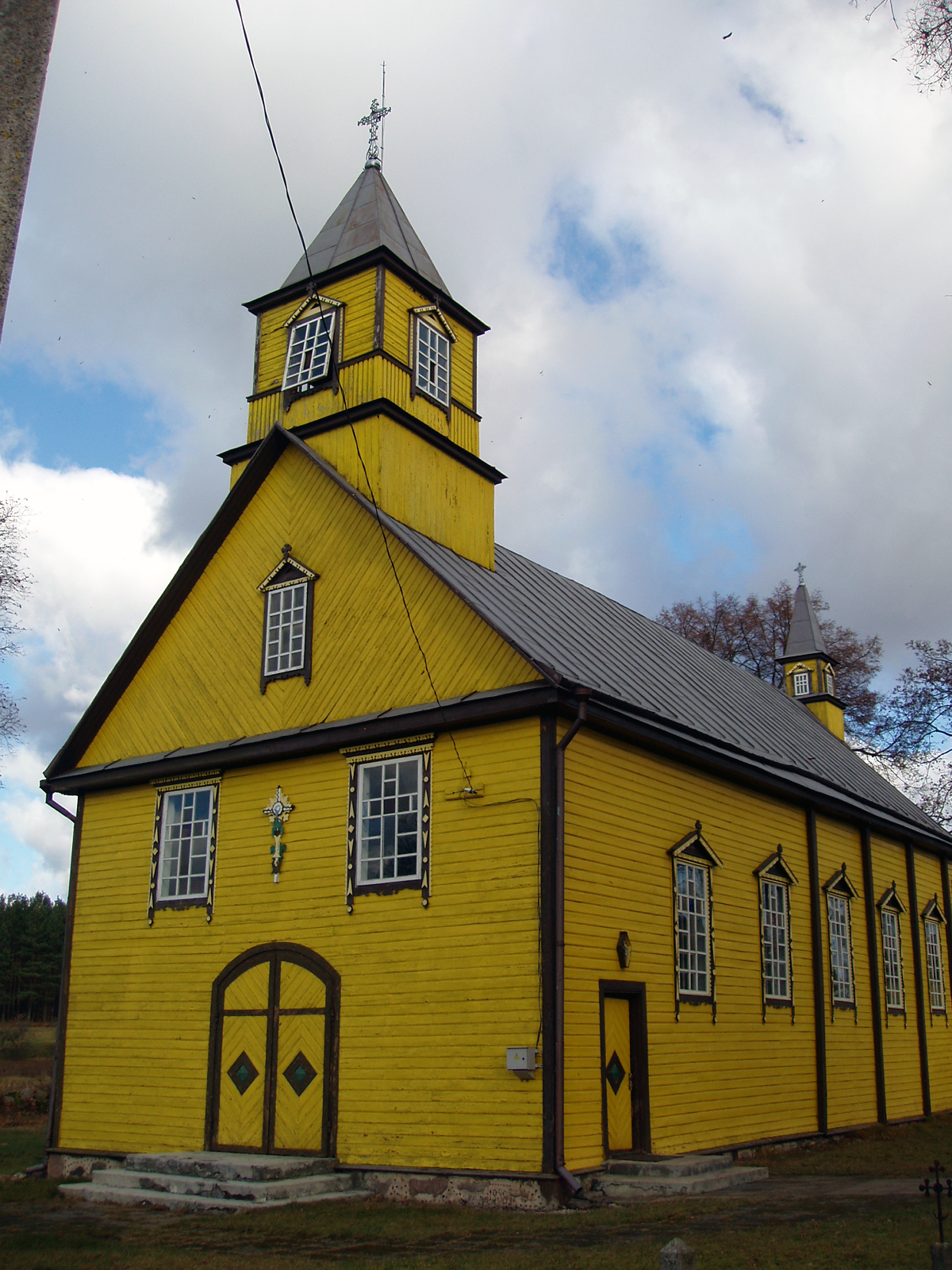 Šilėnai church, Vilnius district, Lithuania